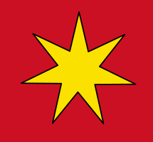 Etoile à sept branches